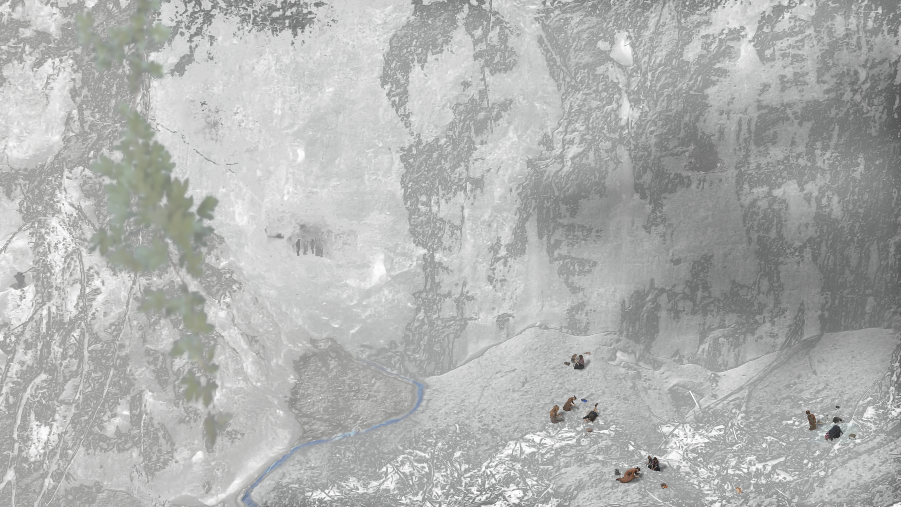 Stop klatka z eksperymentalnego filmu "Hej, tam w dolinie", 12min.46sek., HD, 2014-2016. Założeniem autora jest nieustająca rozbudowa filmu, aż do śmierci.